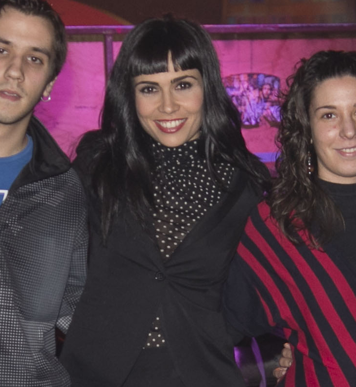 Itziar Atienza en el plató de Vaya Semanita.